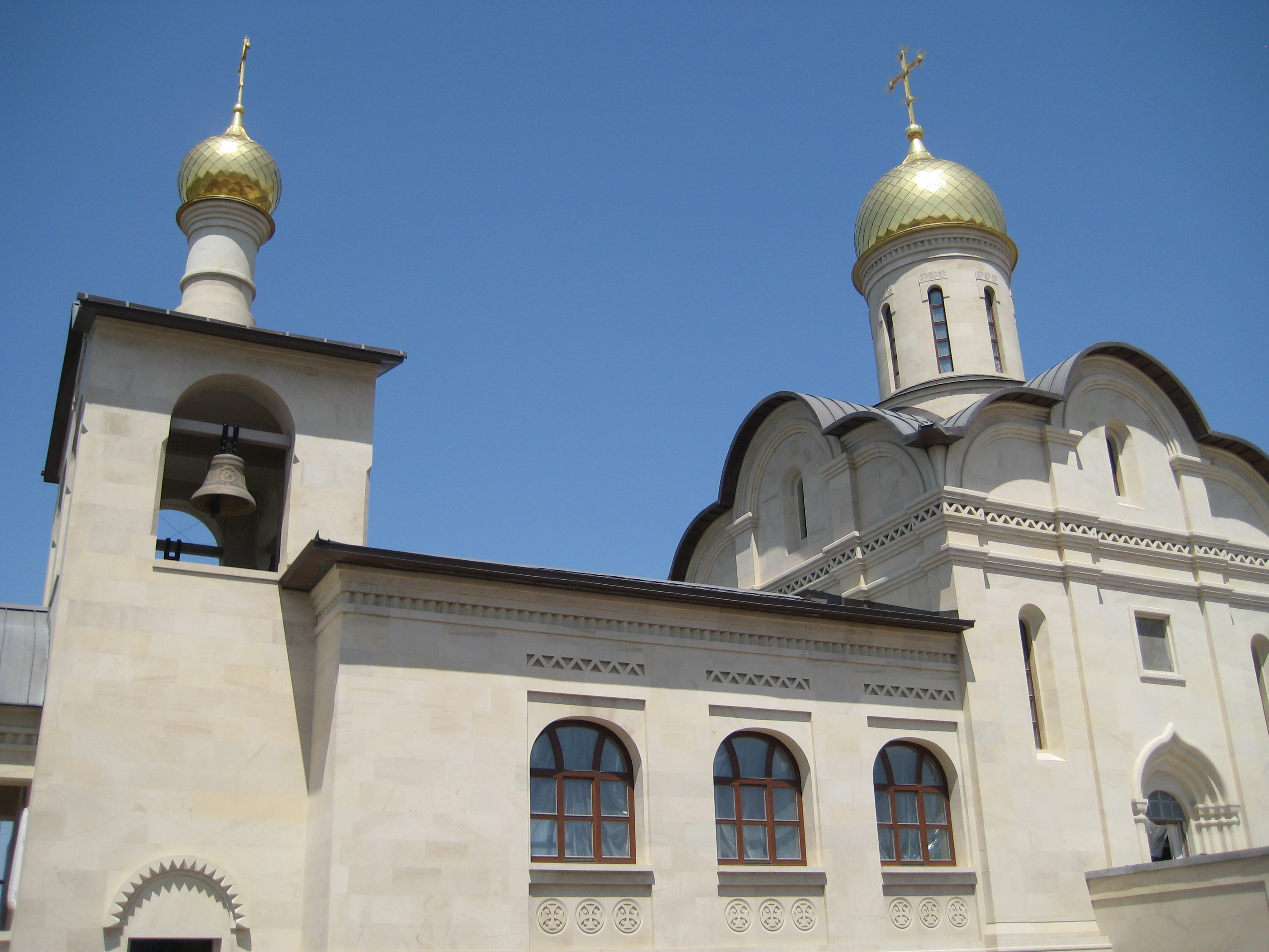 Новая православная церковь построенная в2016году в городе Ереване